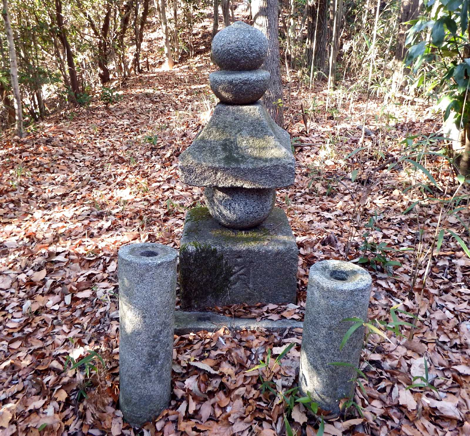 仙遊寺の五輪塔